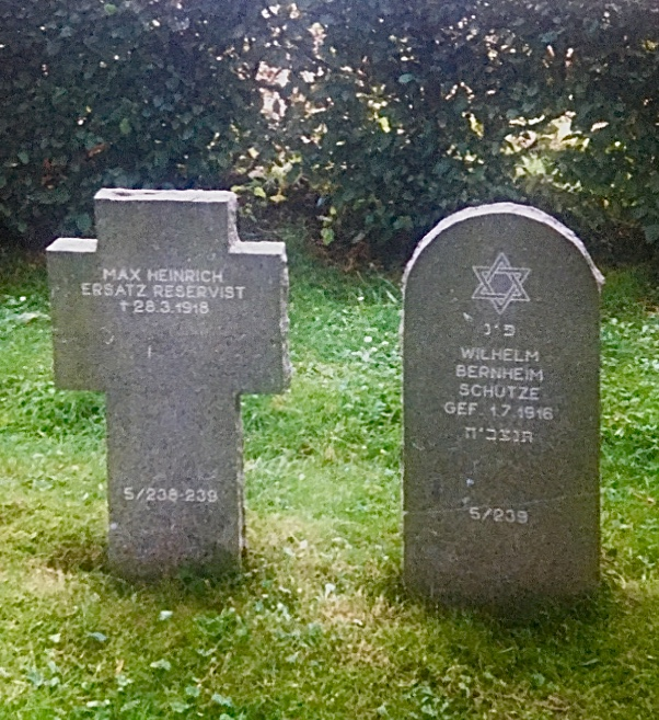 Ruhestätte des Schützen Wilhelm Bernheim (gef. 01.07.1916) auf einem Kriegsgräberfriedhof in der Nähe von Cambrai